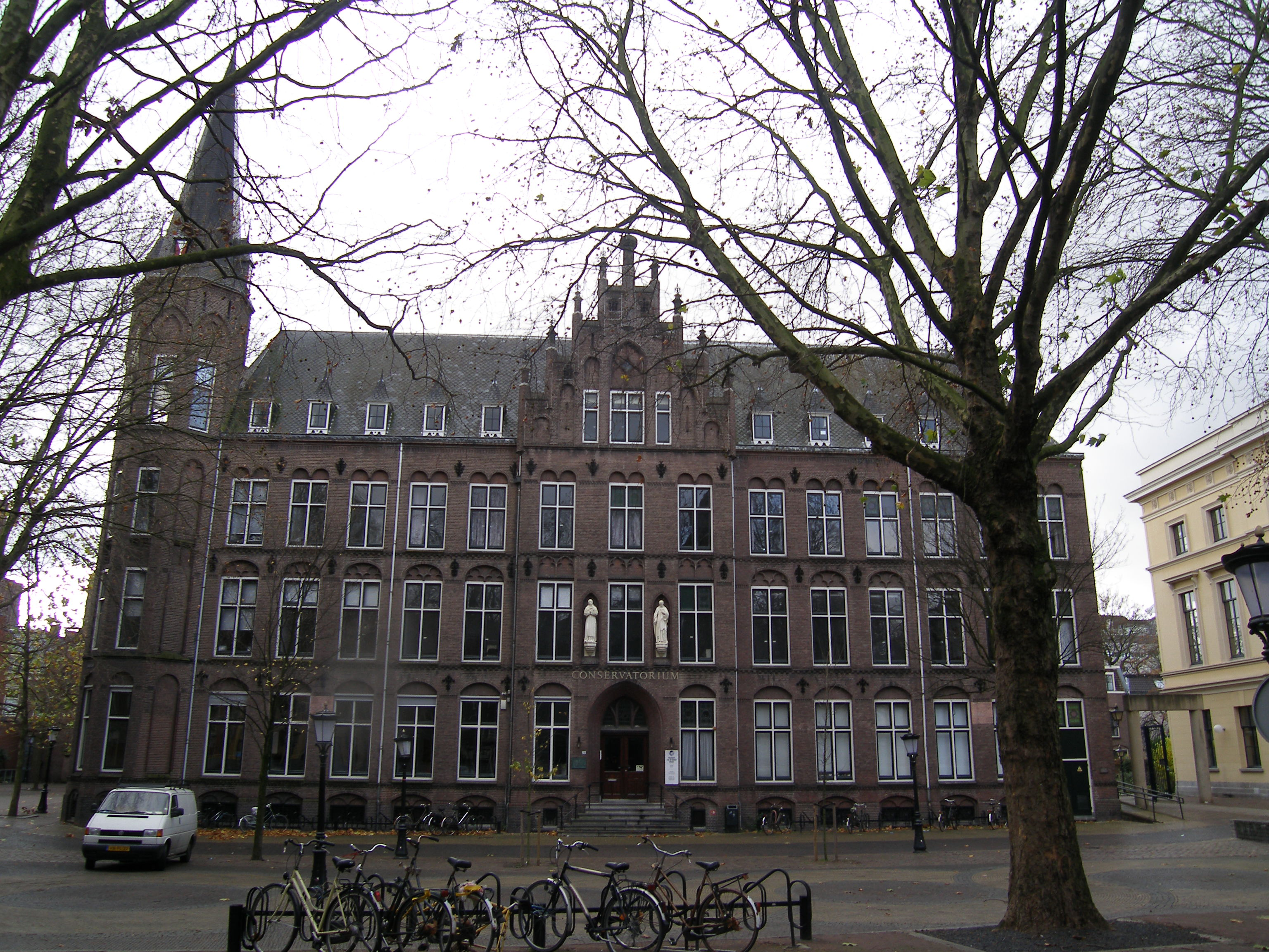 St Joannes de Deo, Utrecht.